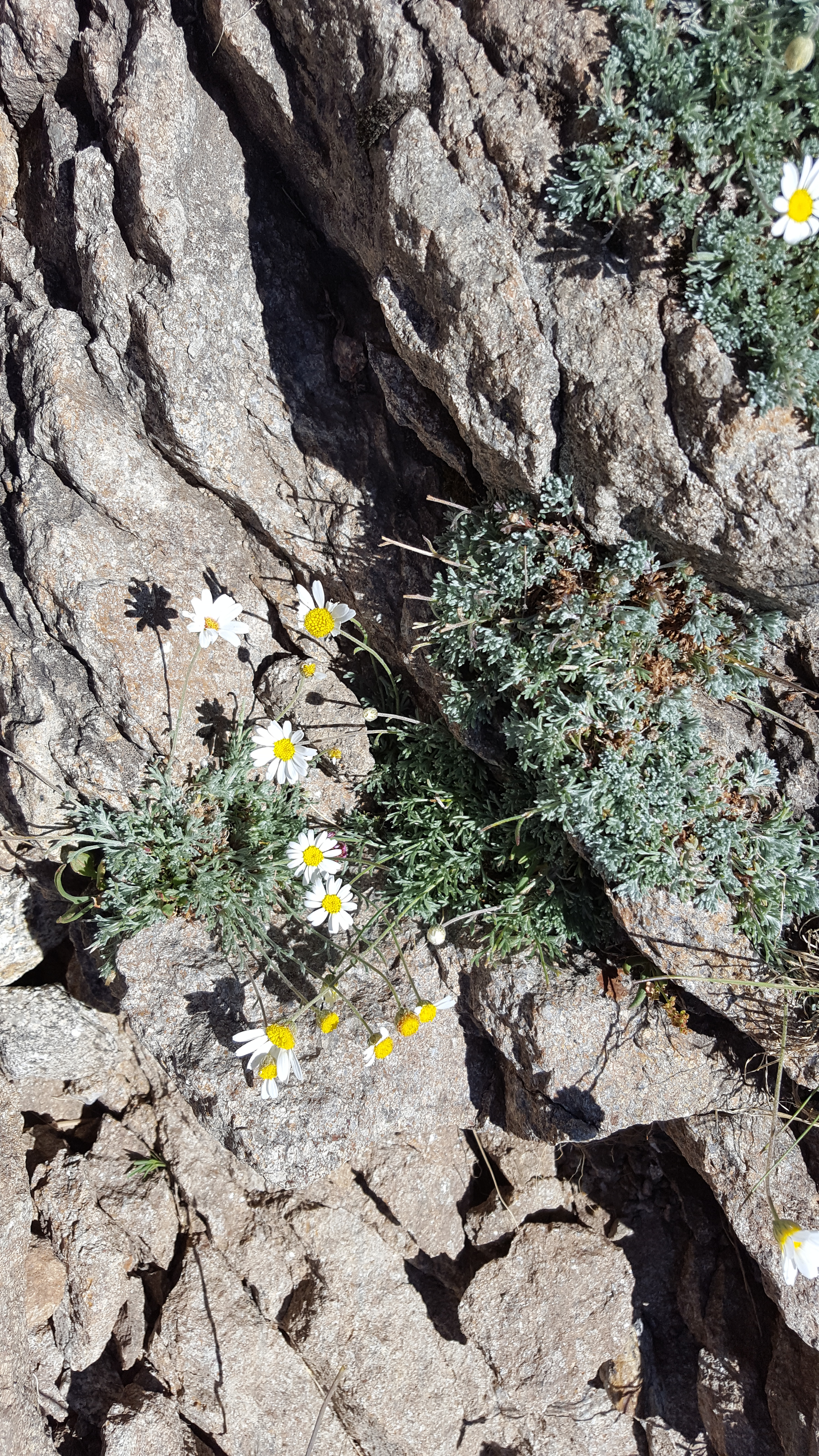 Margarita serrana en Gredos, Ávila, España